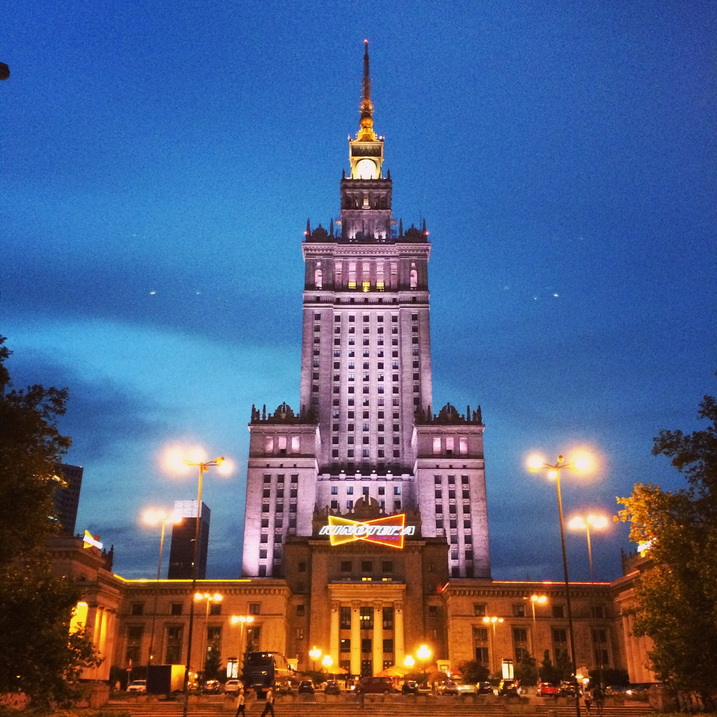 Warszawa, Pałac Kultury i Nauki